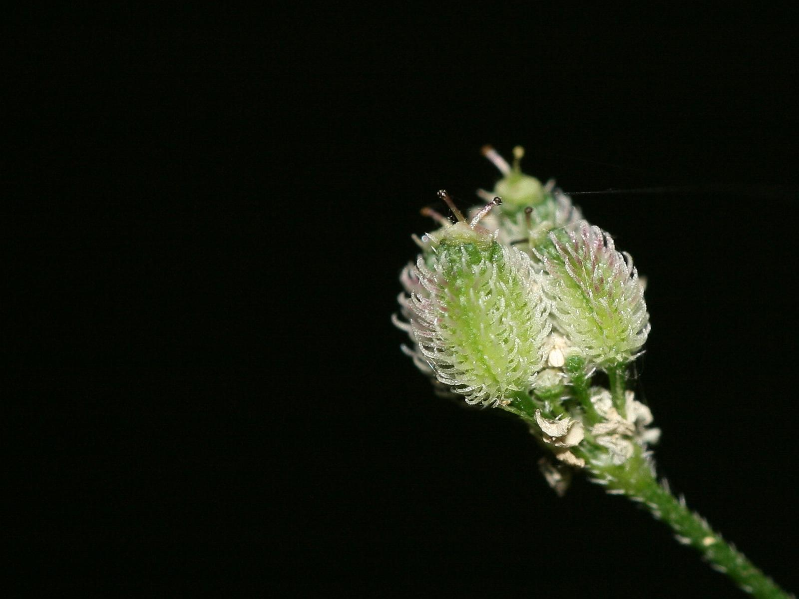 Gewöhnlicher Klettenkerbel (Torilis japonica)